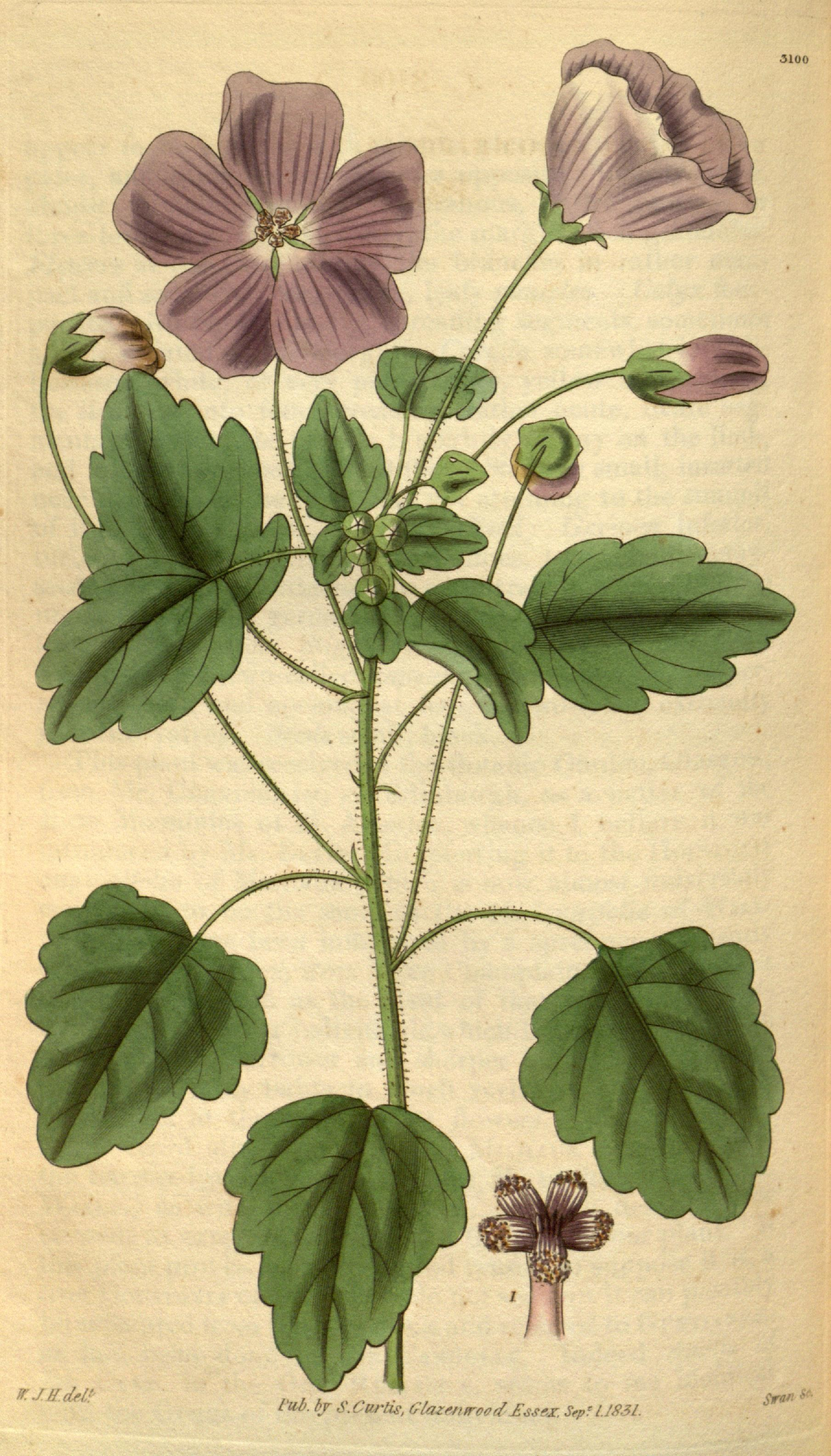 KJ.g.dell Vub. bv S.Cprlis, Glazenmed '£ss*t, S